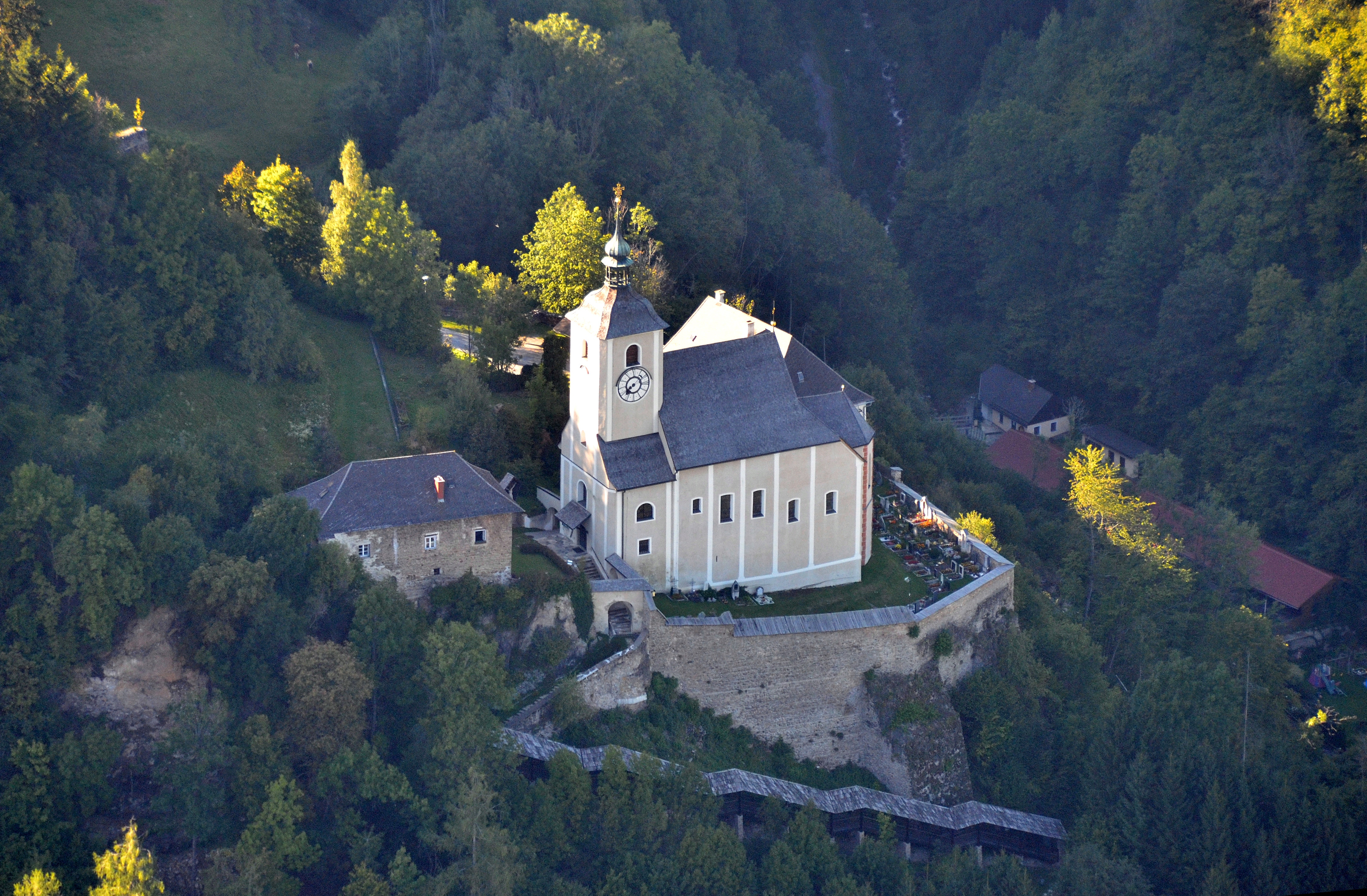 Kath. Pfarrkirche hl. Jakob der Ältere, Unzmarkt-Frauenburg, Bezirk Murtal, Steiermark, Österreich.